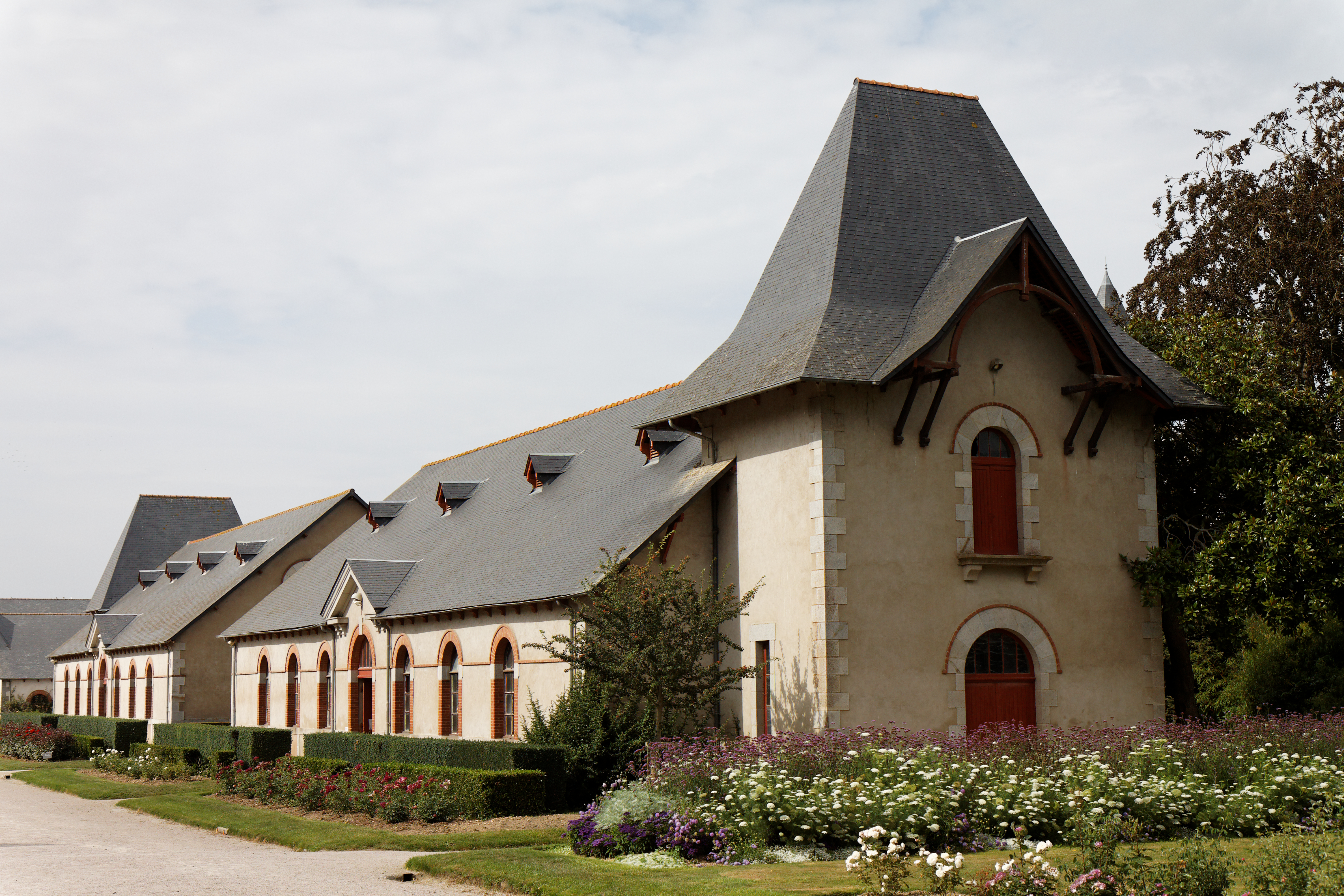 Vue des haras nationaux.